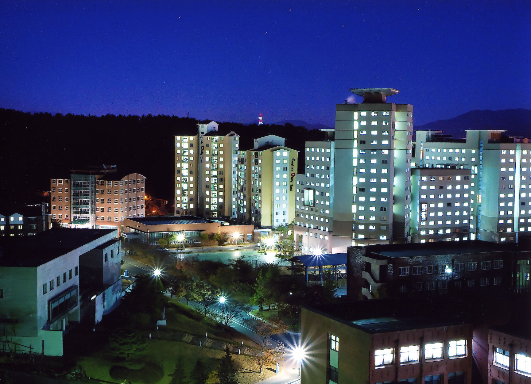 경상대학교 BTL기숙사와 영어전용기숙사 야경